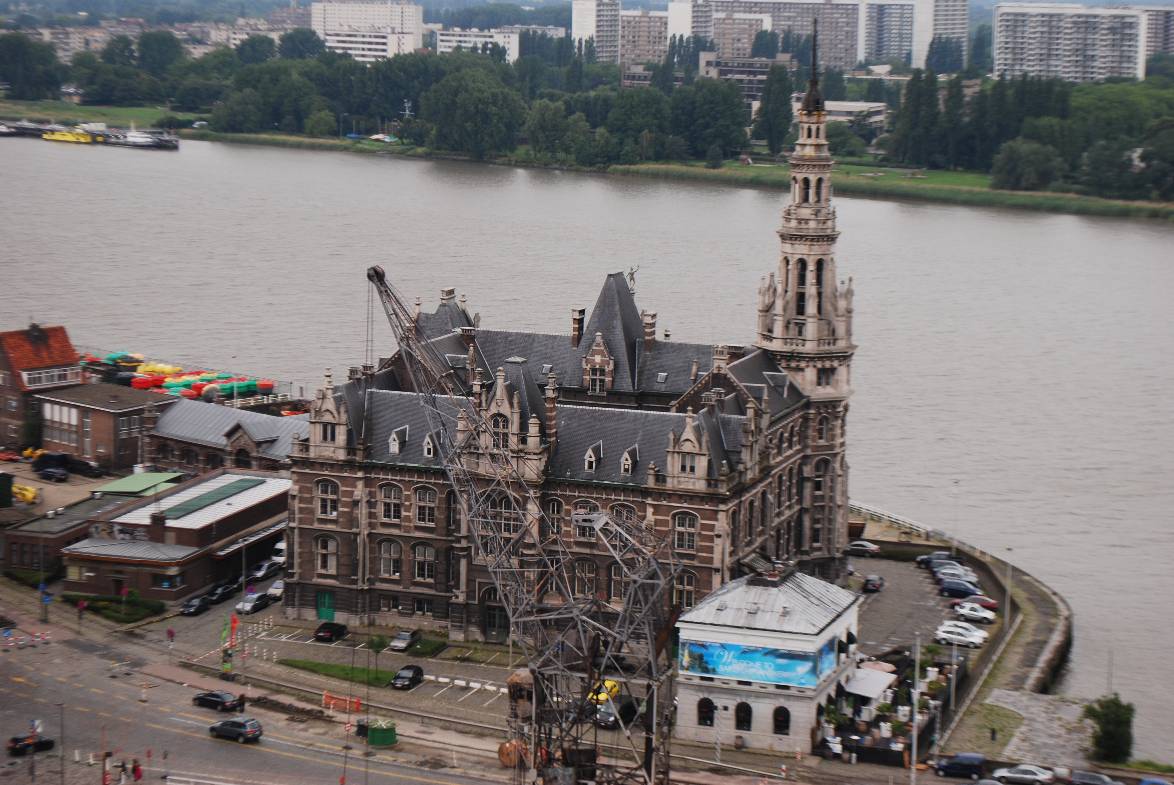 Vue sur la maison des pilotes à Anvers.